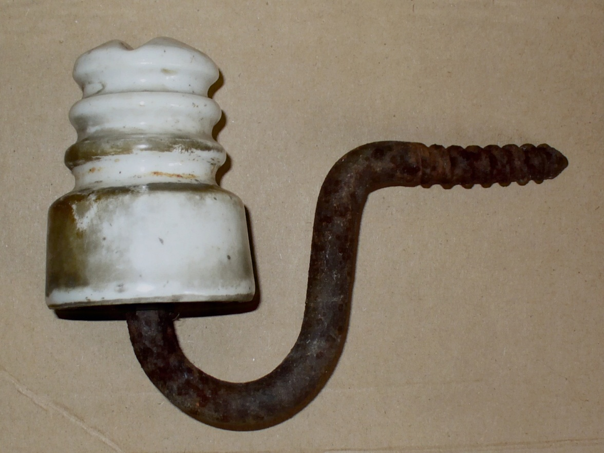 Линейный штыревой изолятор с крепёжным крюком.